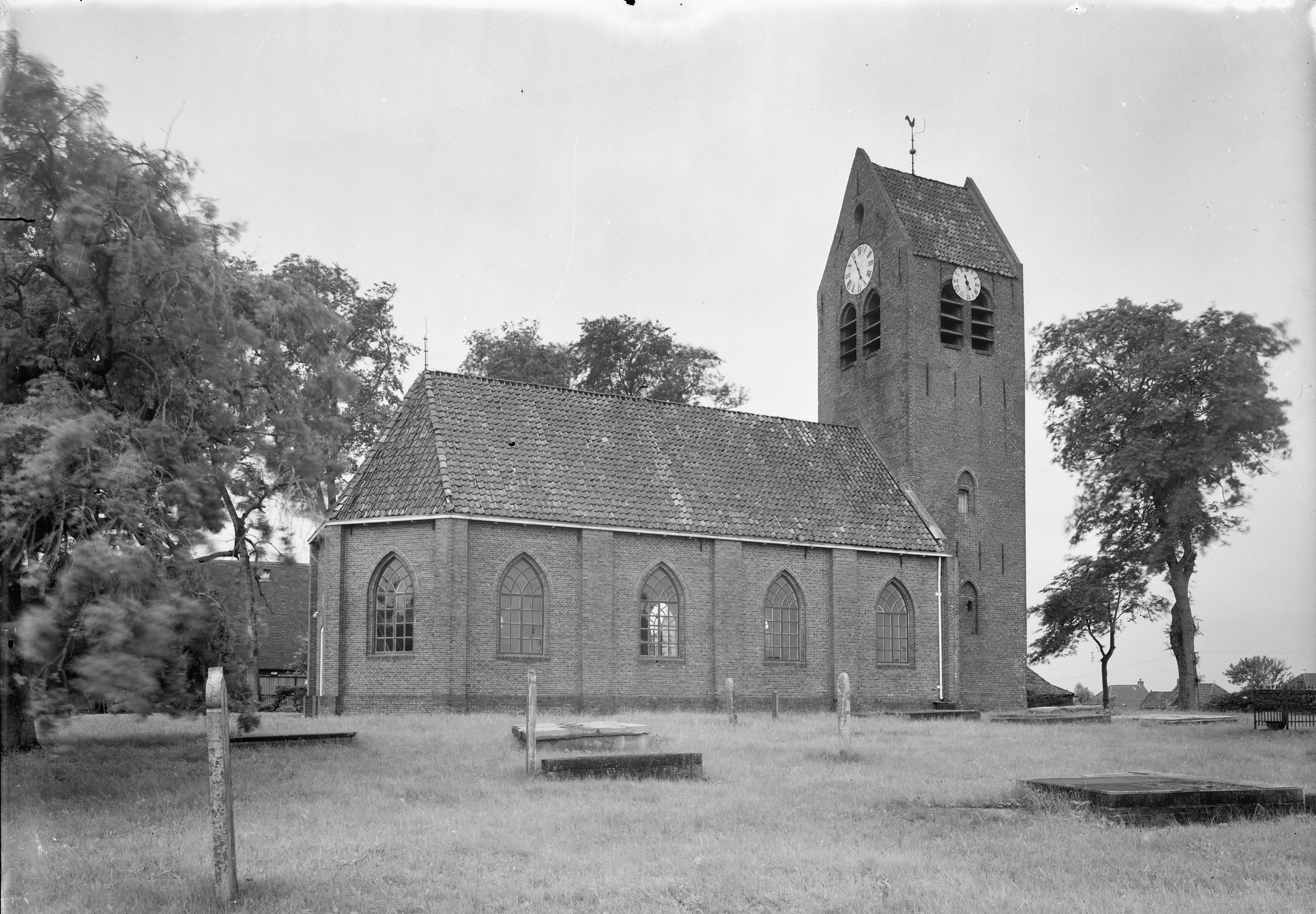 Nederlands Hervormde Kerk: Kerk en toren op verhoogd kerkhof vanuit het noord-oosten